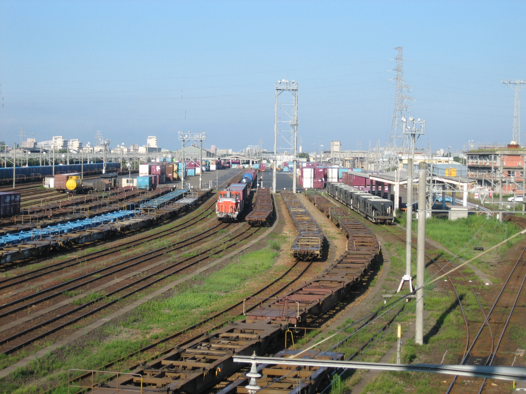 新潟貨物ターミナル駅を望む